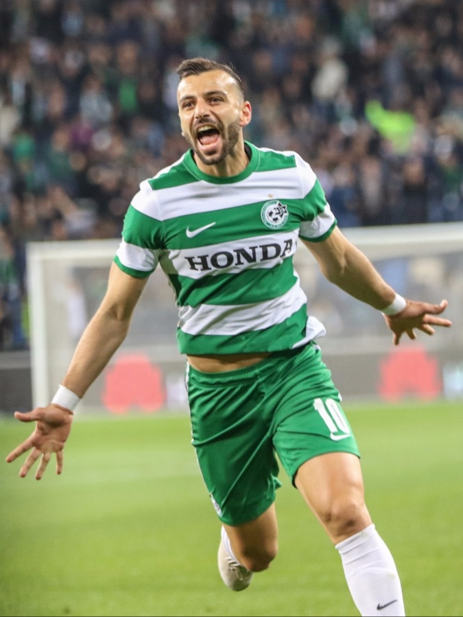 שלומי אזולאי במדי מכבי חיפה